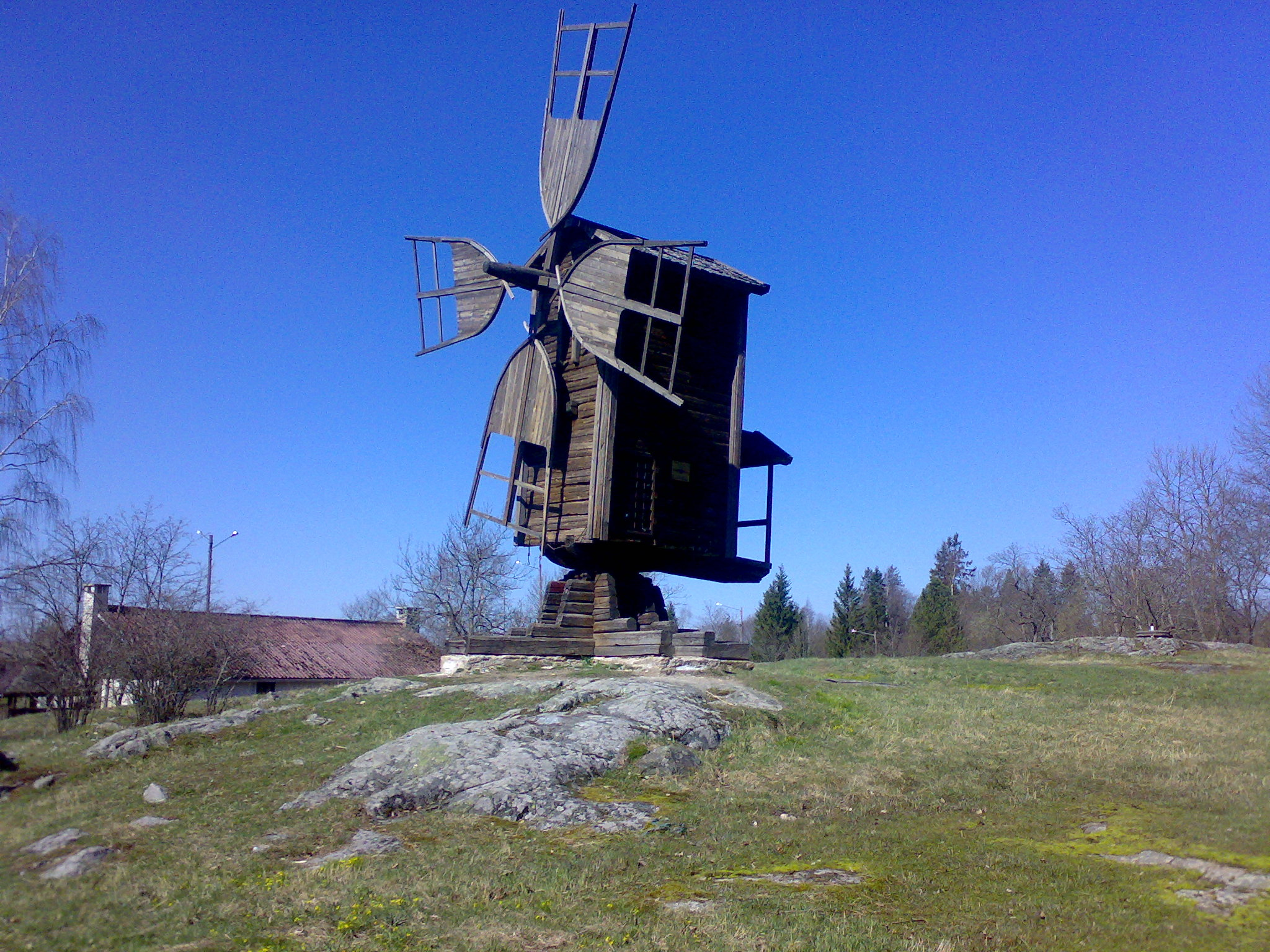 Old Windmill from Vanhankylanniemi